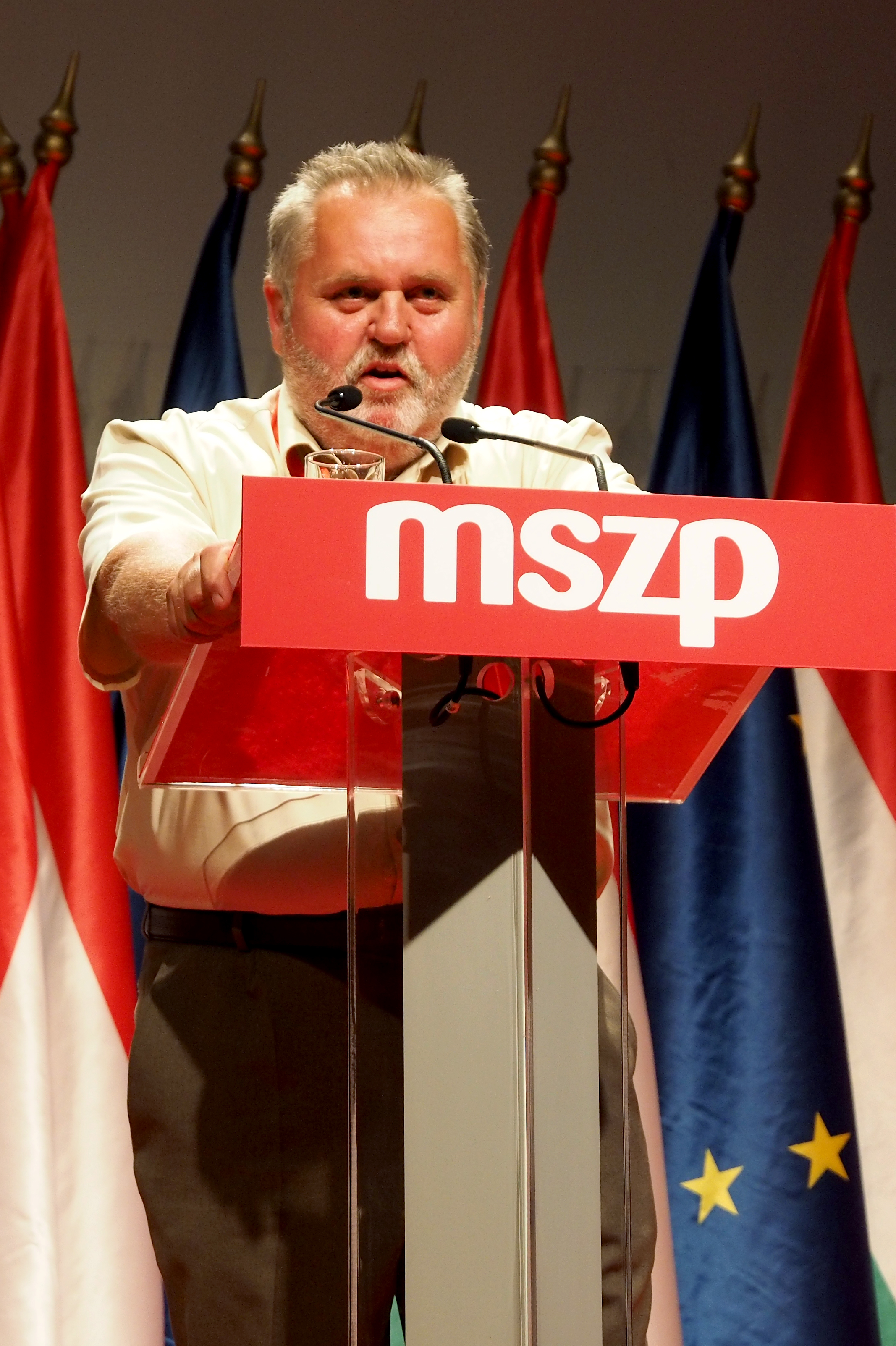 Az MSZP 2014. júliusi kongresszusa. Gőgös Zoltán elnökhelyettes.